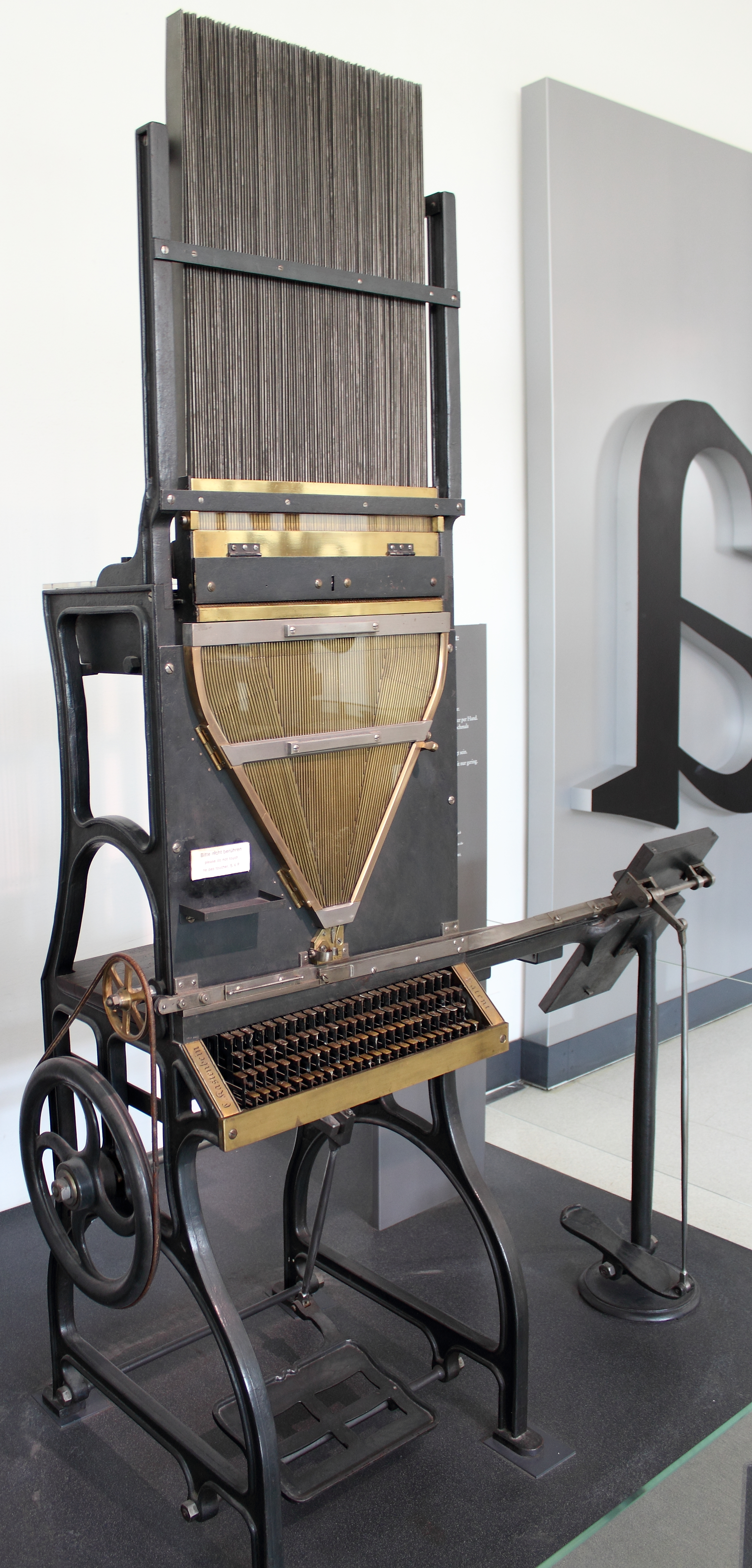 Kastebein settemaskin fra rundt 1879_Deutsches Museum München